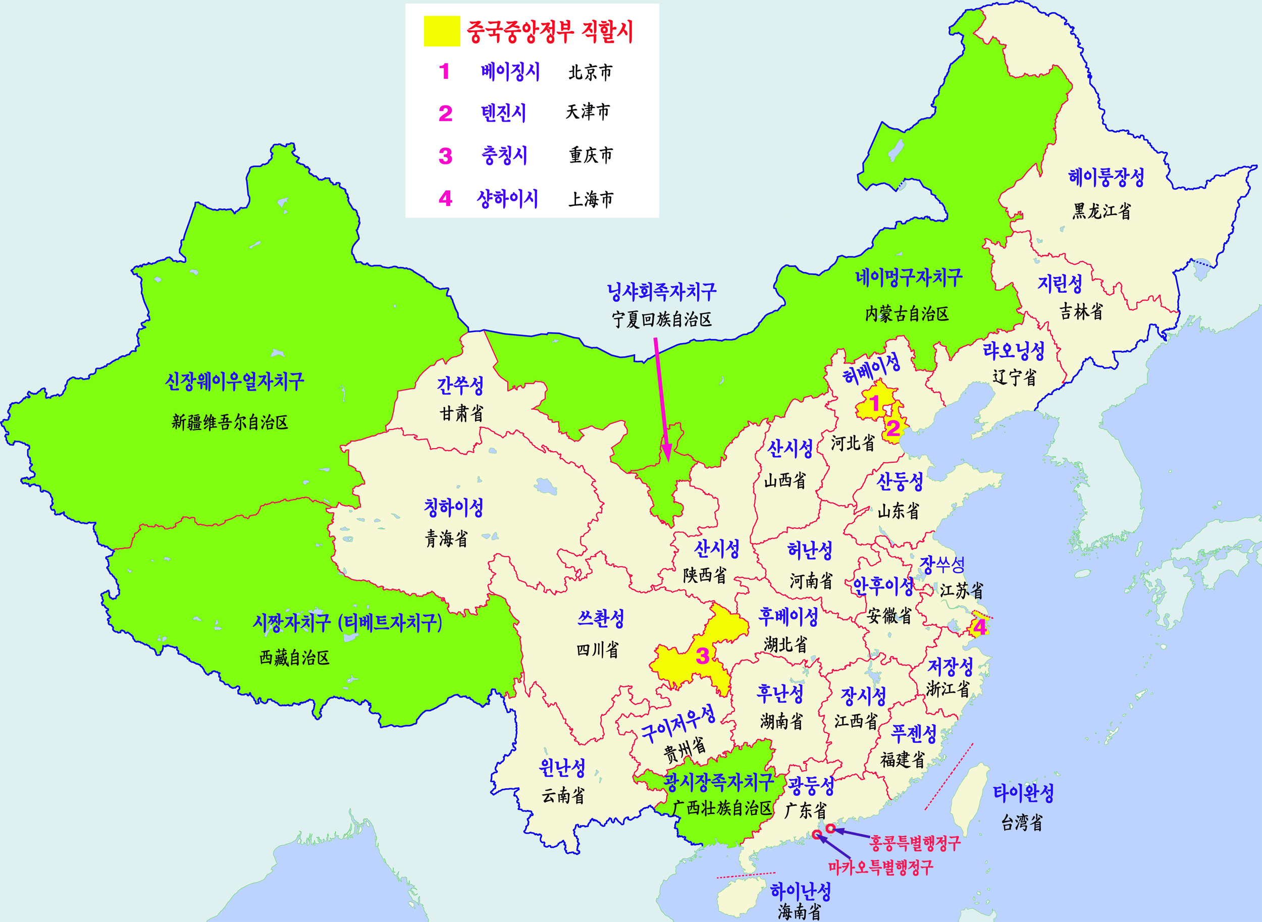 중국행정구역도